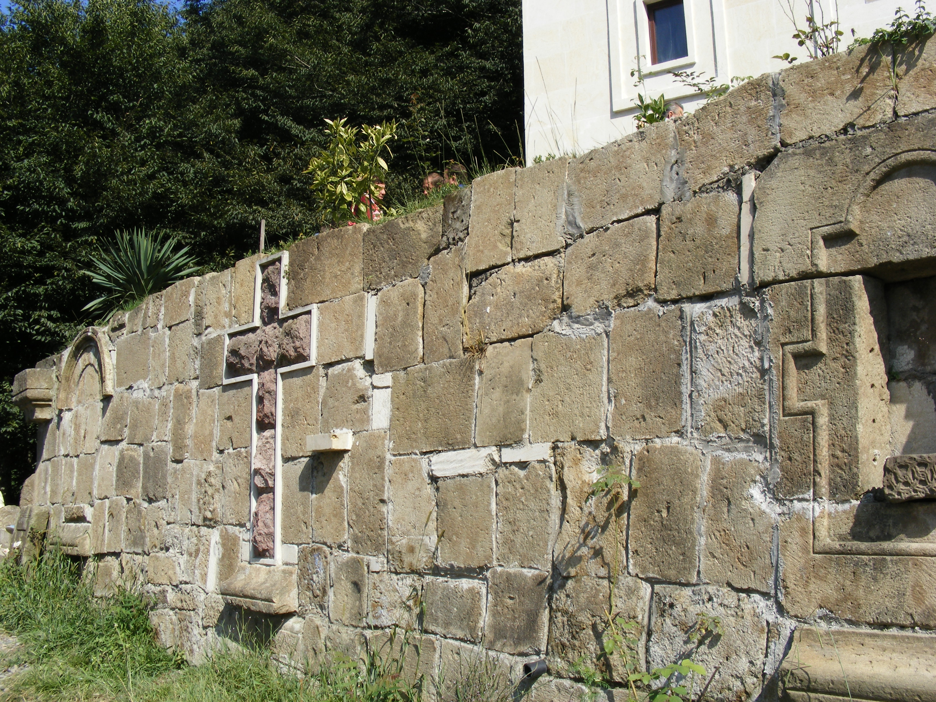 უდაბნოს მონასტერი, ძველი ეკლესიის კედელი, ჩოხატაურის მუნიციპალიტეტი, გურია